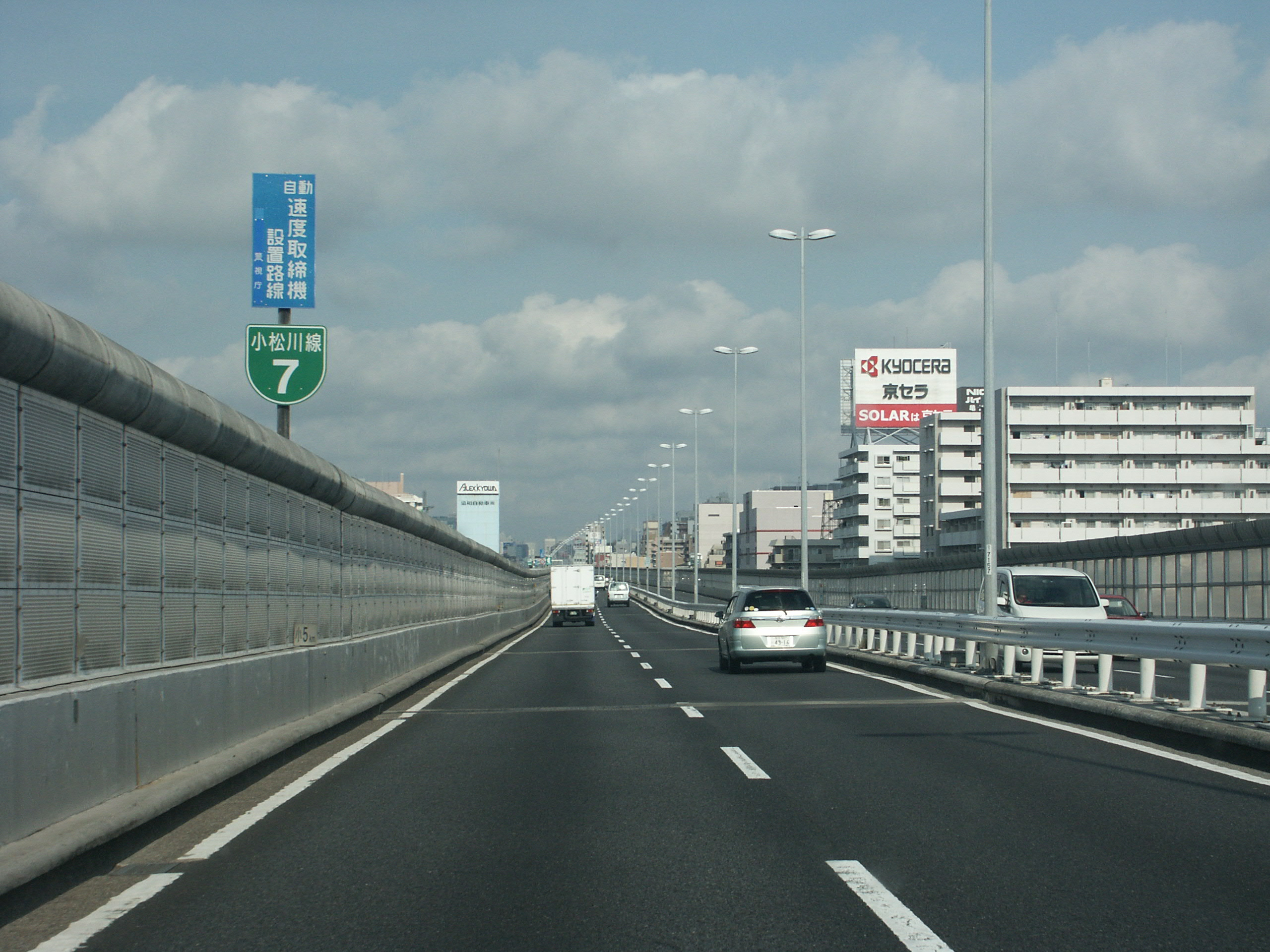 首都高速7号小松川線上り江東区亀戸付近